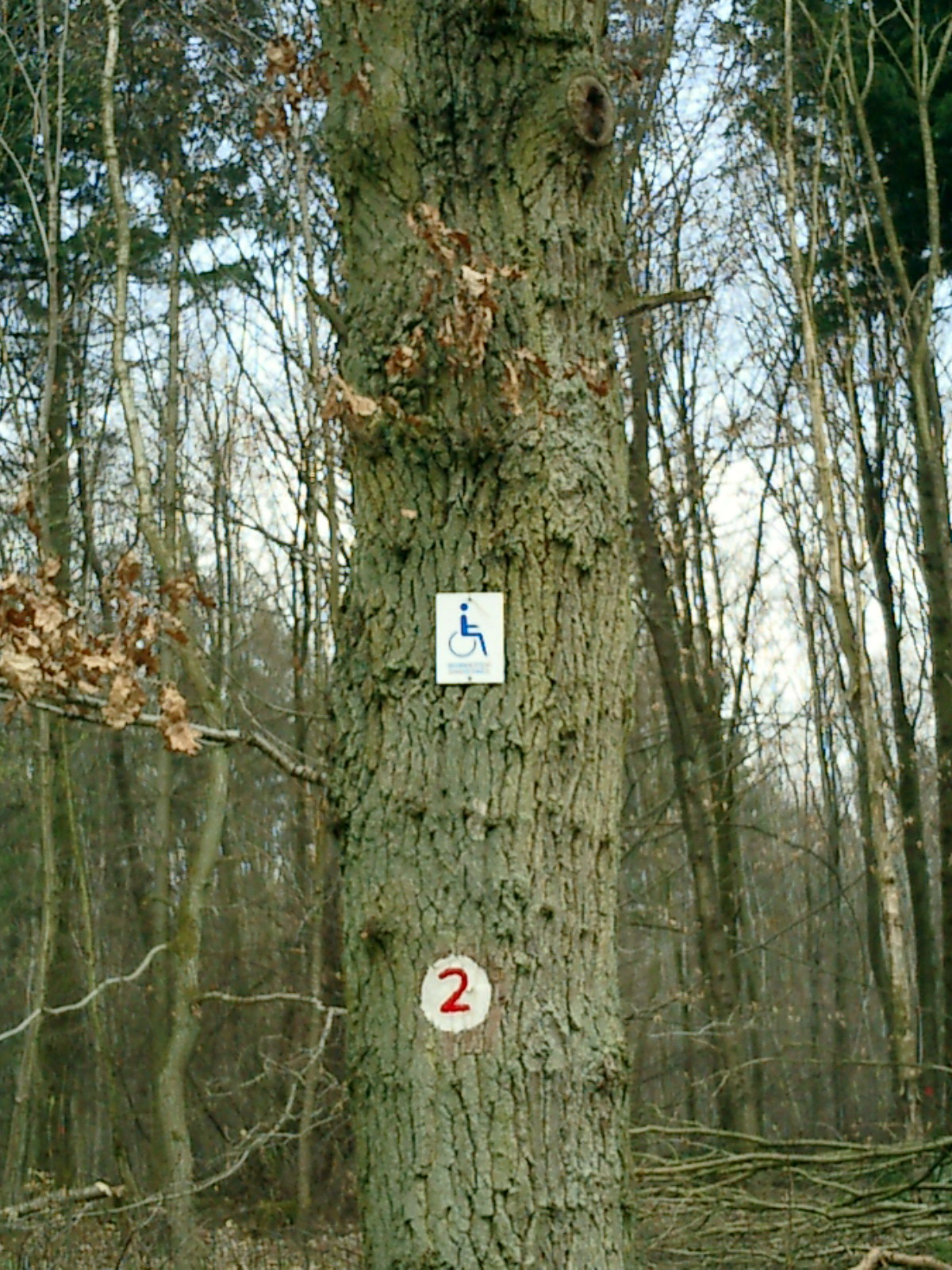 Beschilderung eines Behindertenwanderwegs im Saarland